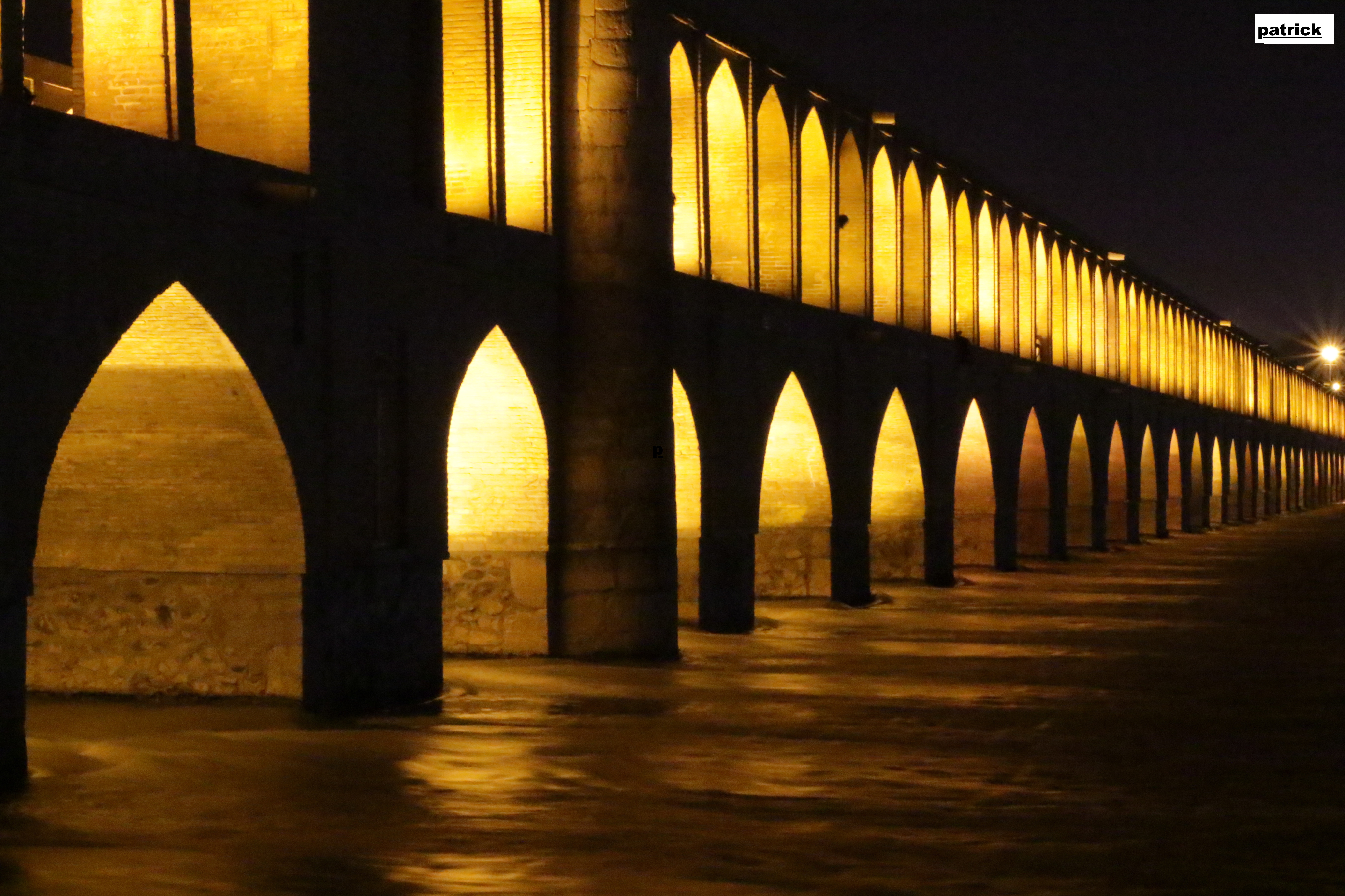 سی و سه پل زیبای اصفهان